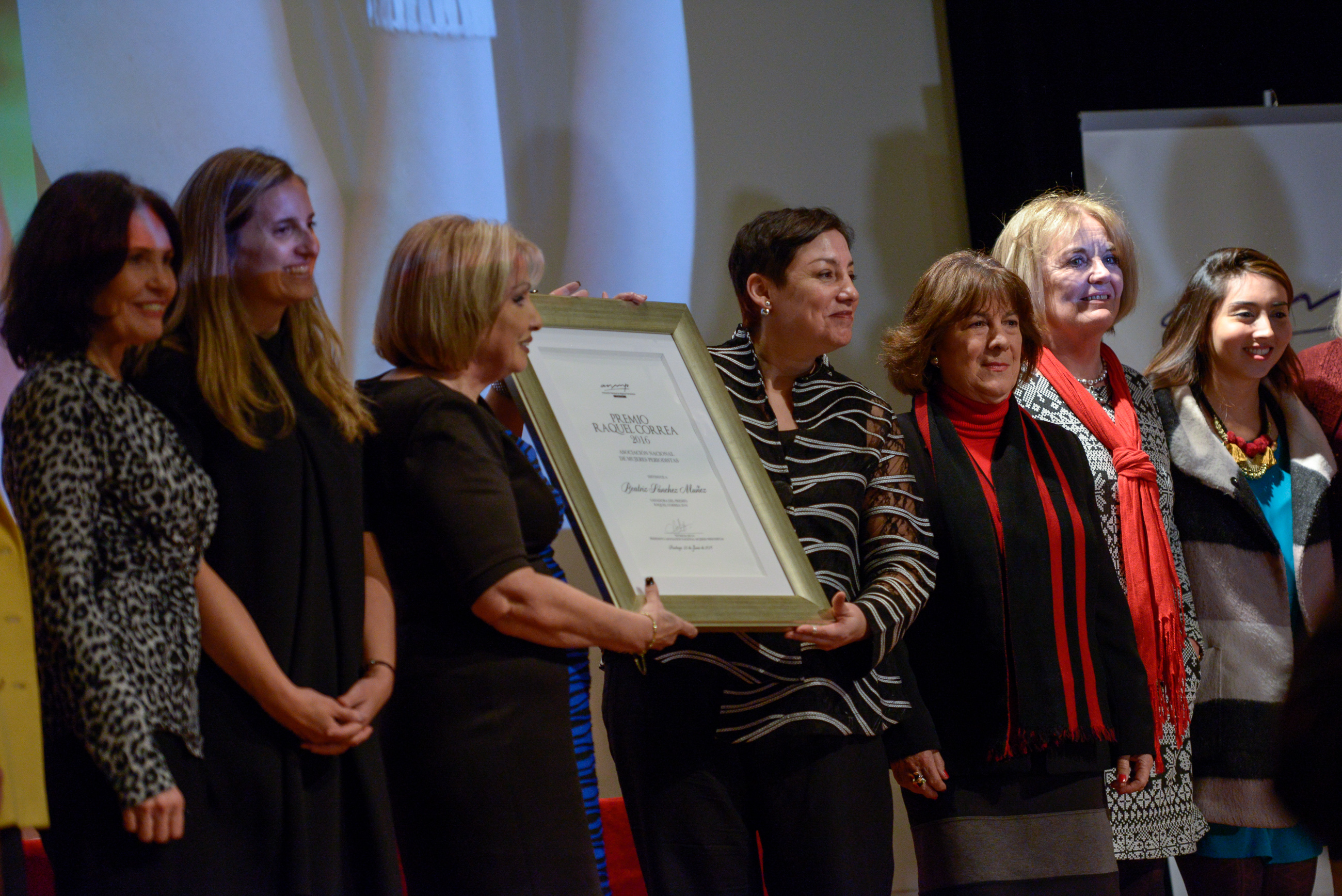 Ministro Díaz asiste a la premiaciín de la periodista Beatriz Sanchez, quien recibe el Premio Raquel Correa